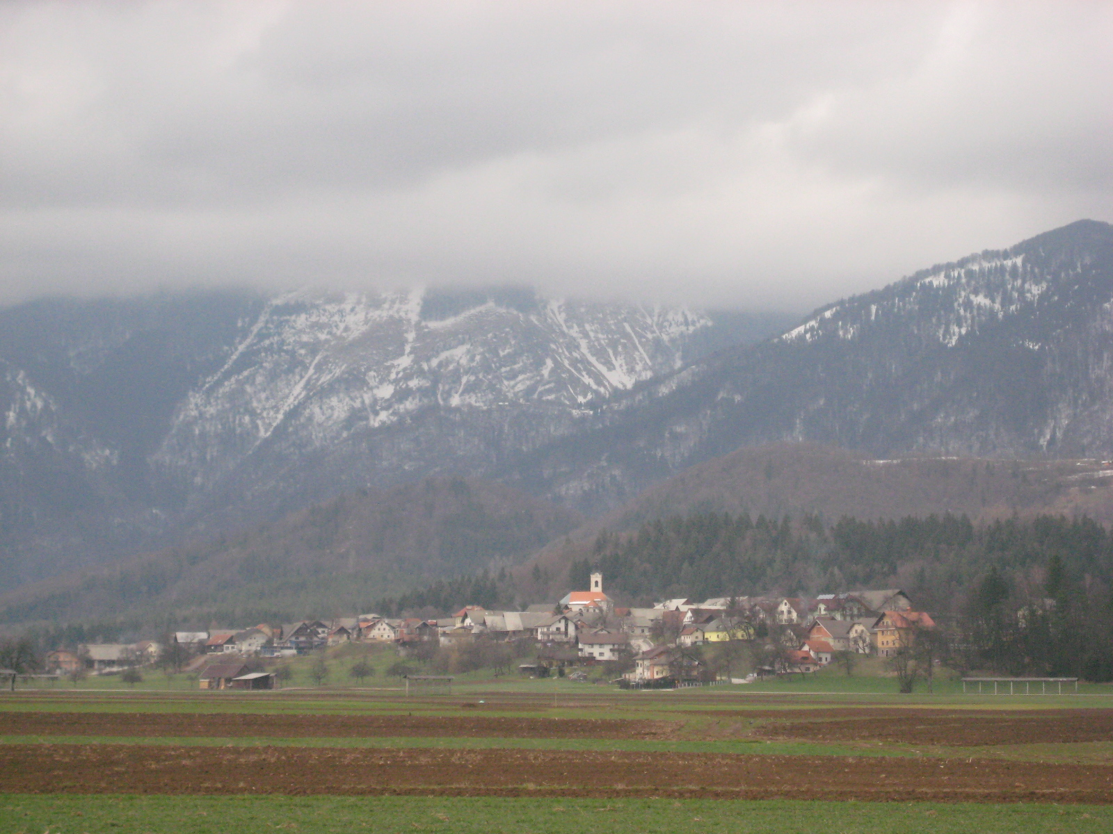 Olševek, village in Slovenia